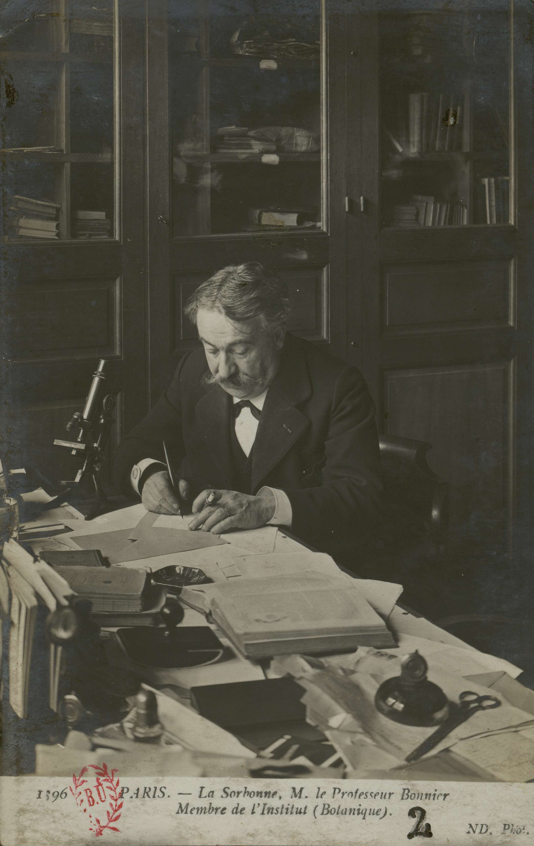 Carte postale